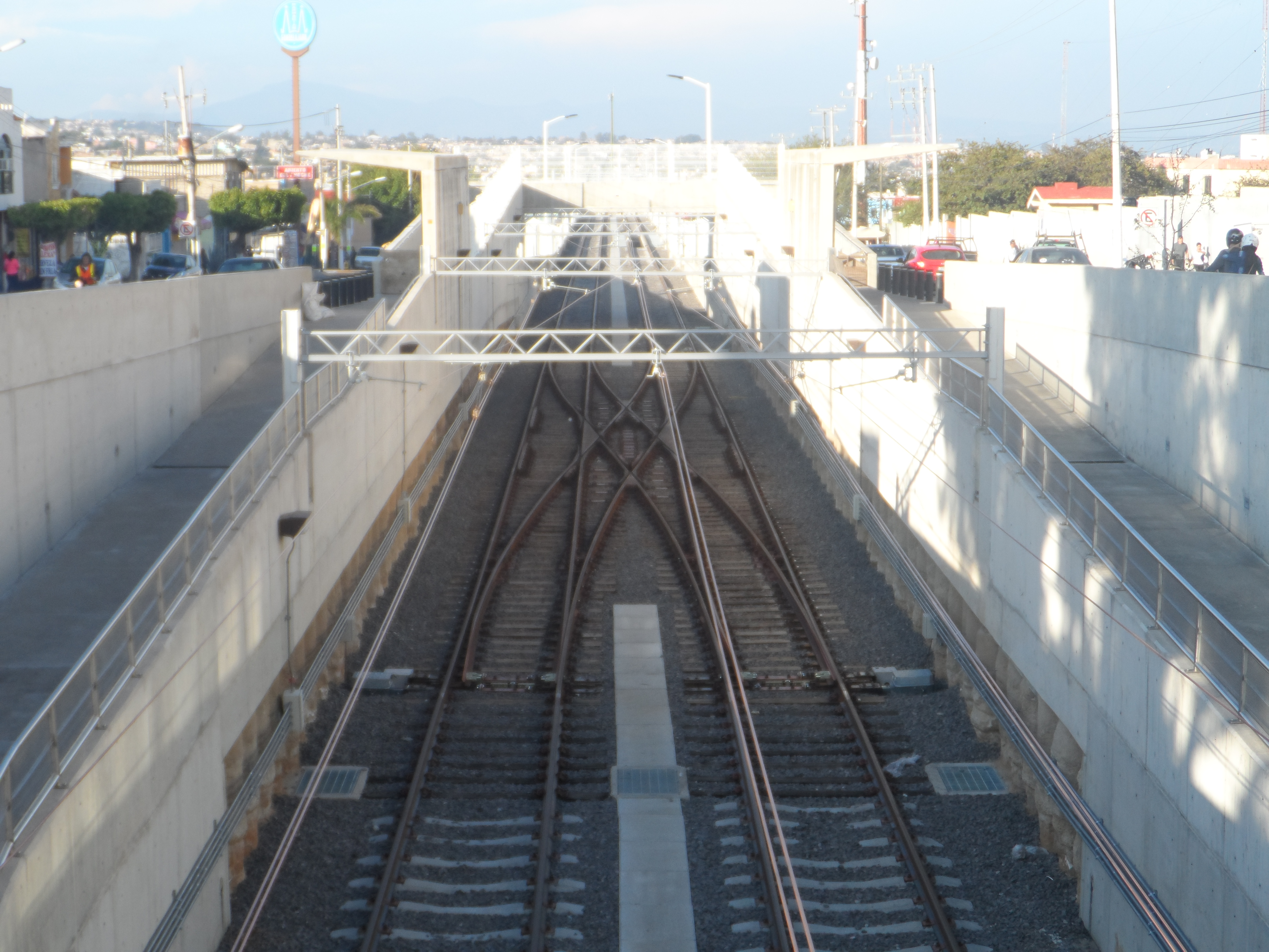 El estacionamiento norte de la Línea 1 del Tren Ligero de Guadalajara, junto a la estación Auditorio.